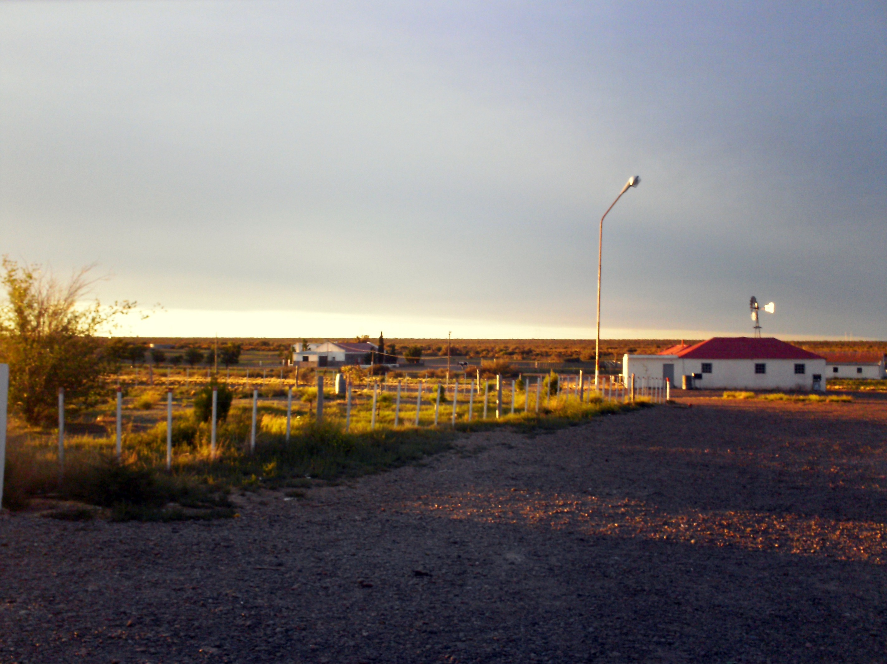 Vista del pueblo desde la ruta